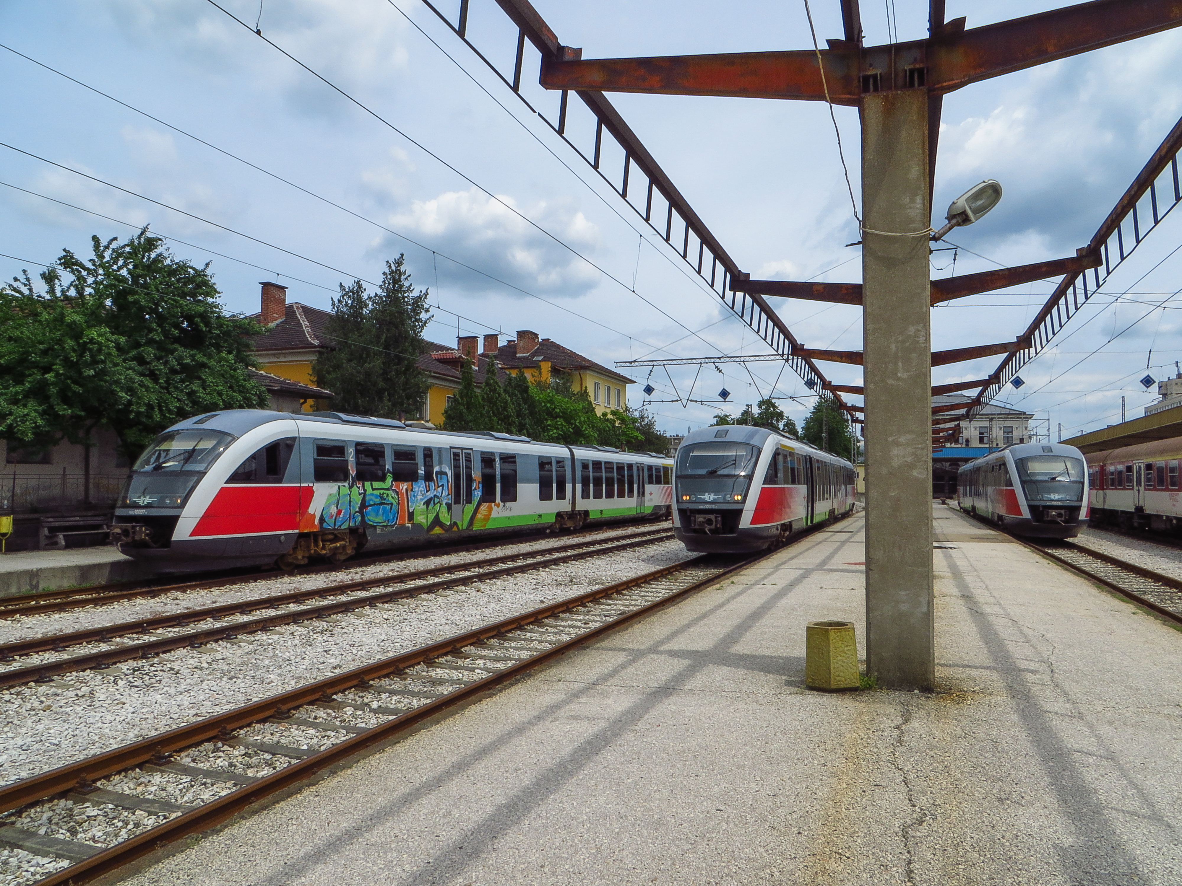 3 x Siemens Desiro DMU; От ляво надясно: 10 007/10 008 с КПВ 82208 Пловдив – Карлово; 10 016/10 015 с КПВ 81204 Пловдив – Панагюрище; 10 028/10 027 с КПВ 18206 Пловдив – Пещера, съотв. на 6-ти, 4-ти и 3-ти челни коловози на Централна ЖП гара Пловдив – 16 Май 2017г.